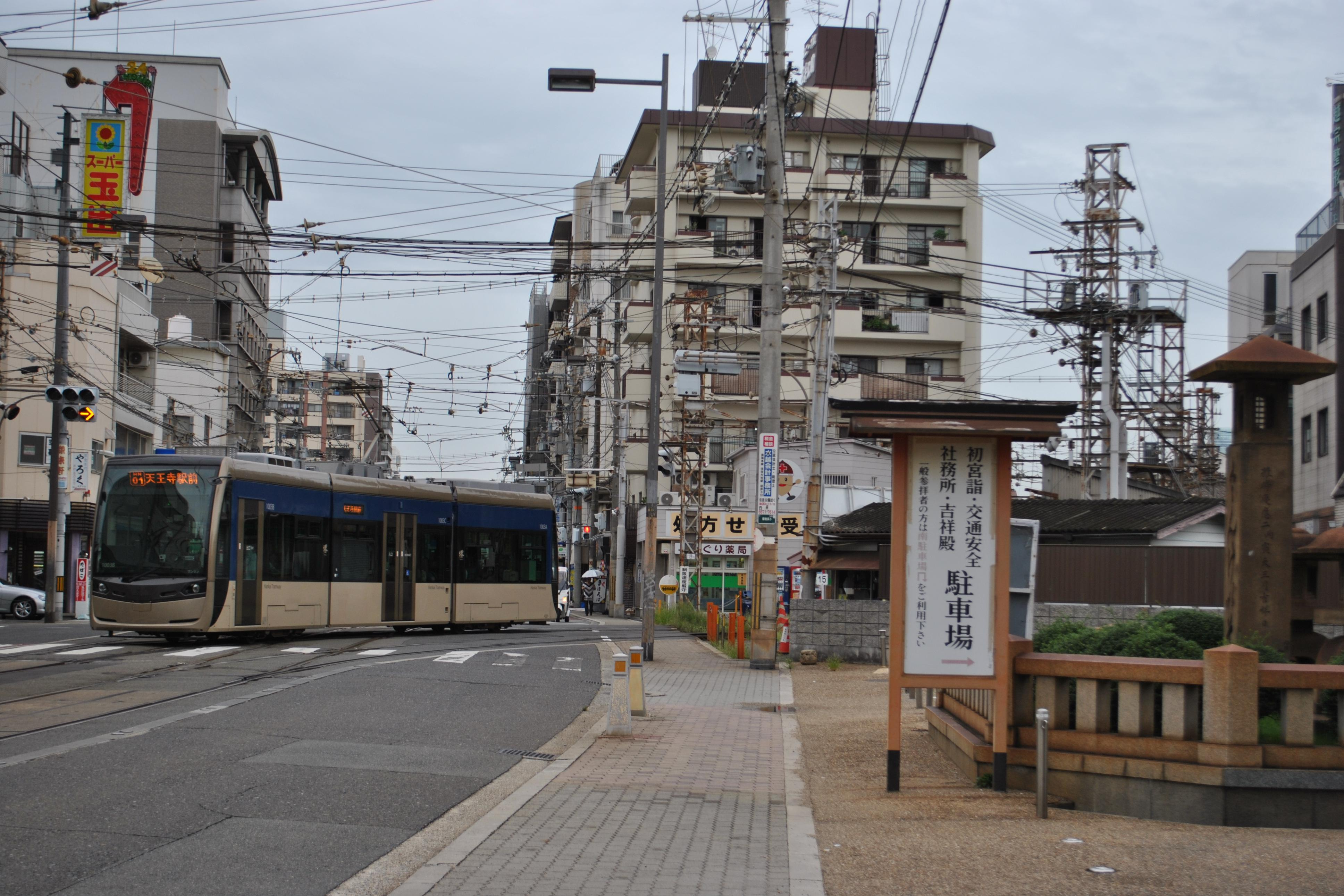 阪堺電気軌道の1001形車両住吉にて